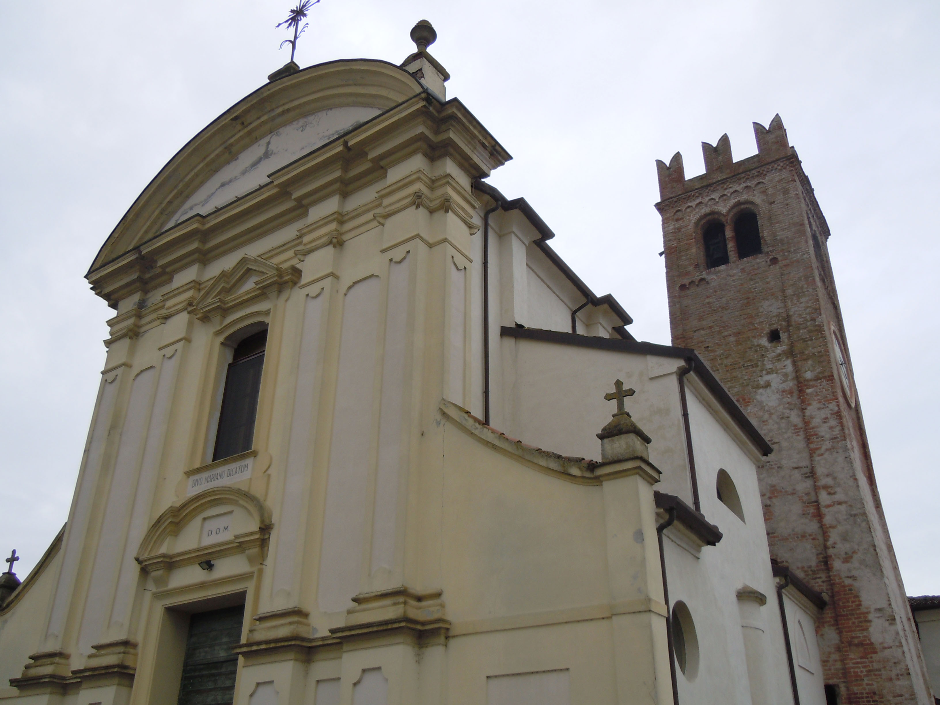 Marcaria, frazione Canicossa, chiesa di S. Mariano.